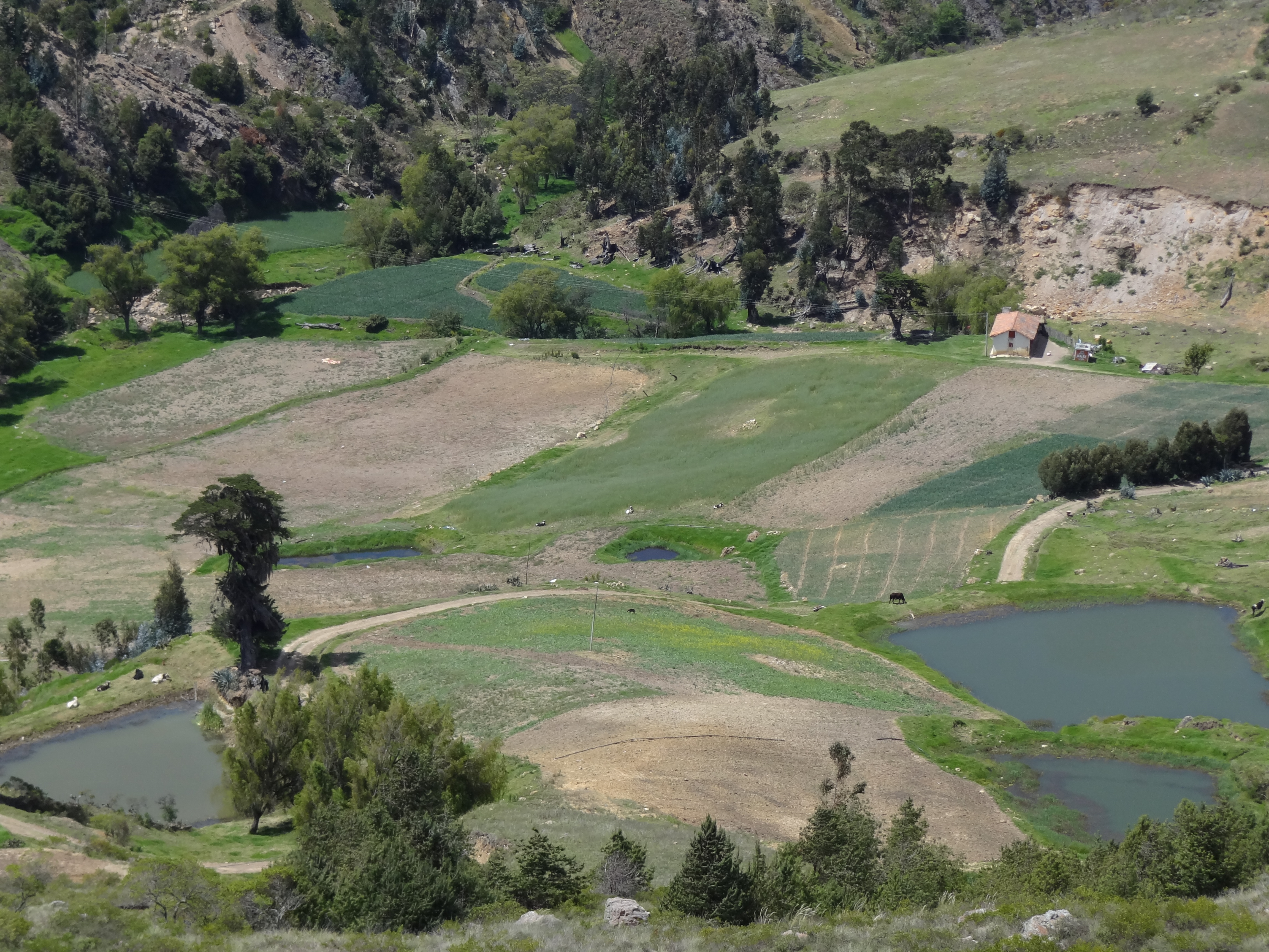 Cultivos de cebolla (Allium cepa) en territorio del municipio de Sora, departamento de Boyacá, Colombia